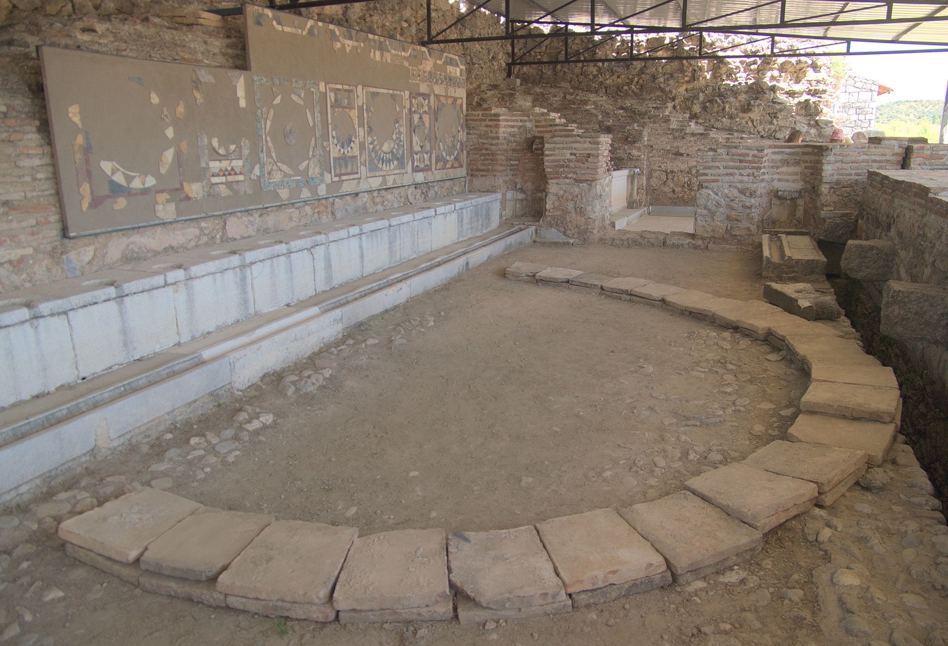 Магнесия на Меандре. Общественный туалет